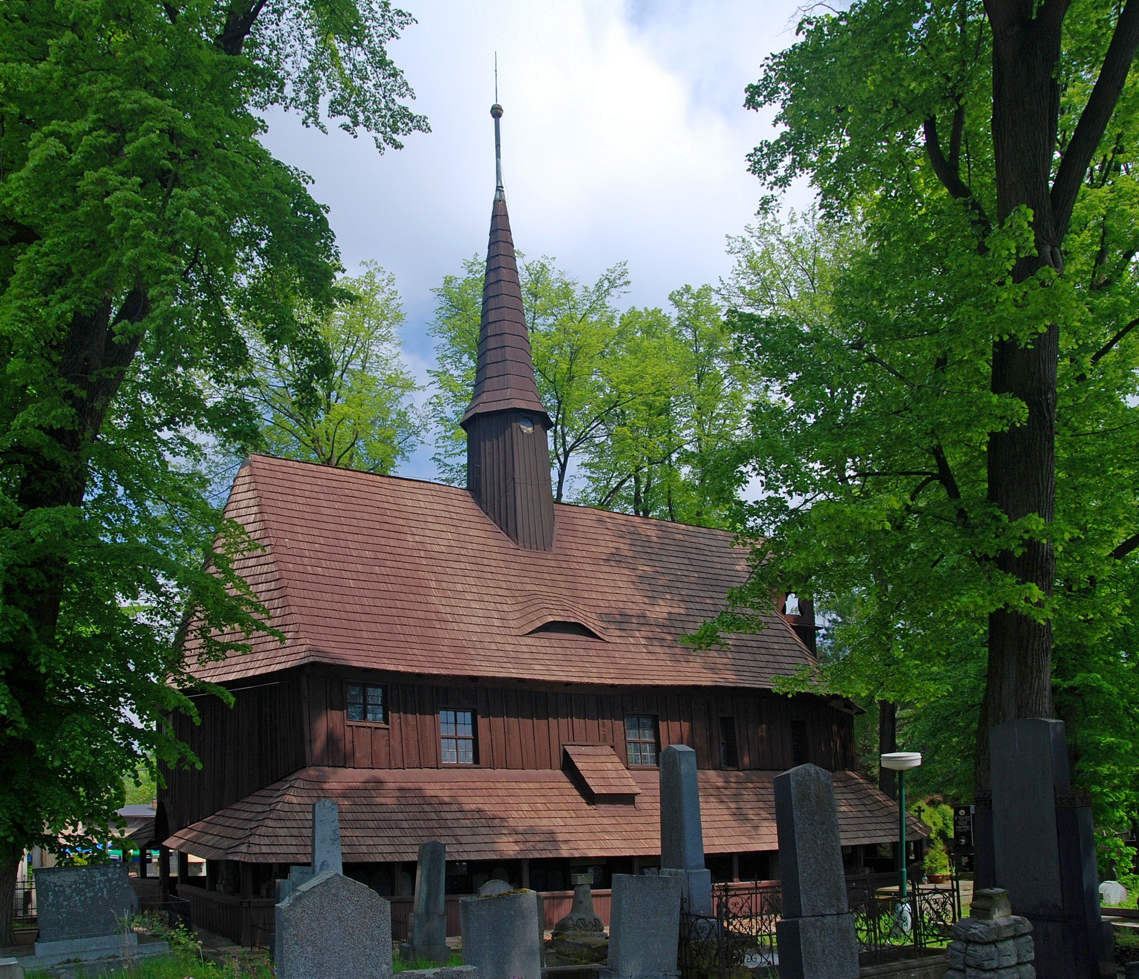 miasto Broumov